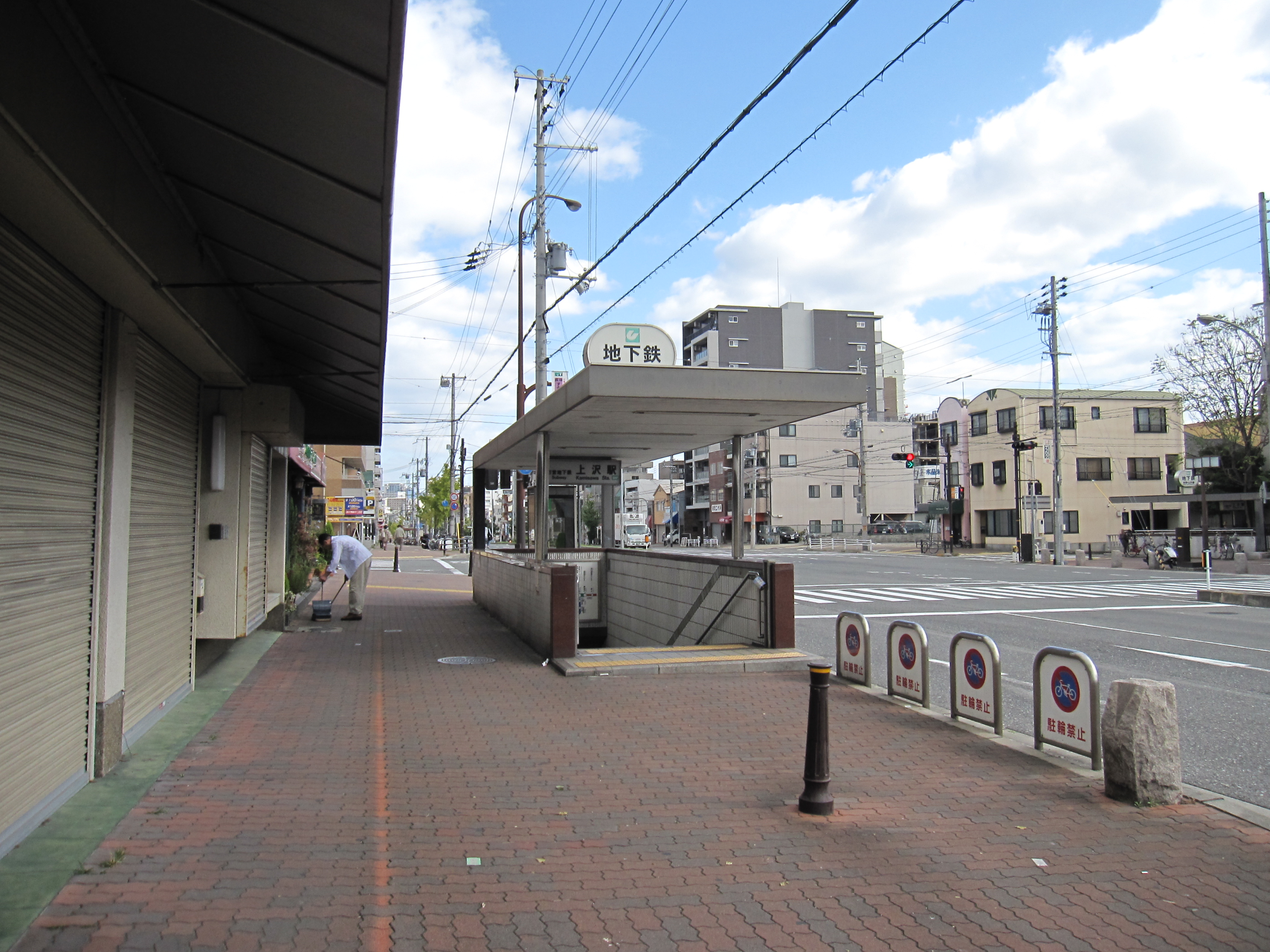 神戸市営地下鉄上沢駅